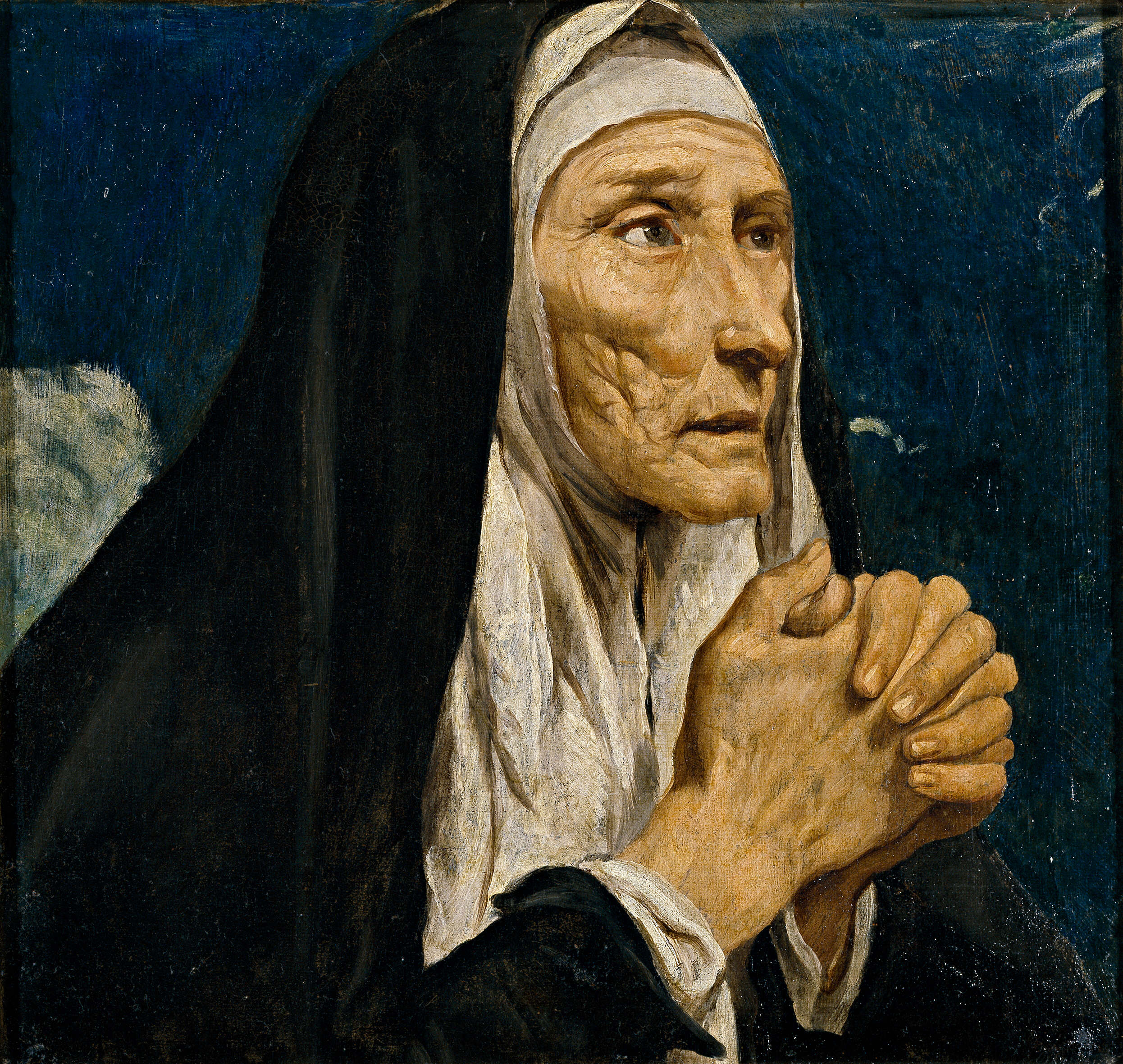 La obra representa a Santa Mónica, la madre del célebre escritor y teólogo San Agustín de Hipona, que es uno de los Padres de la Iglesia.